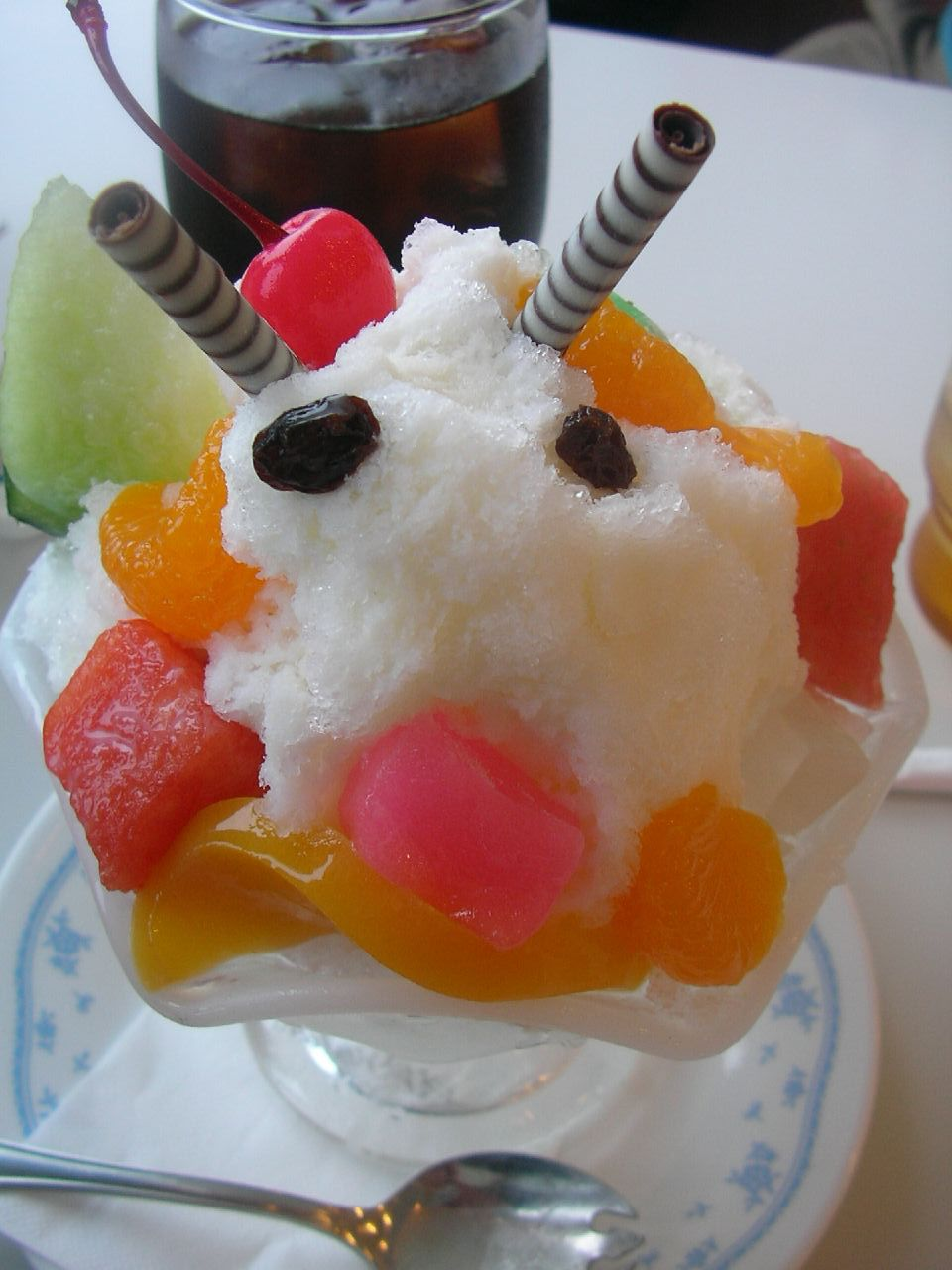 氷白熊(エアポート山形屋・鹿児島空港) Shirokuma Shaved Ice